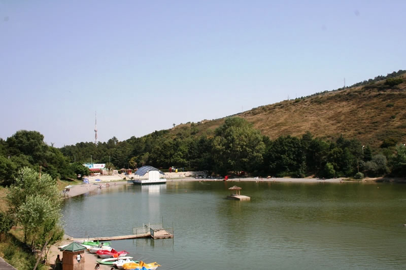 Turtle Lake, Tbilisi